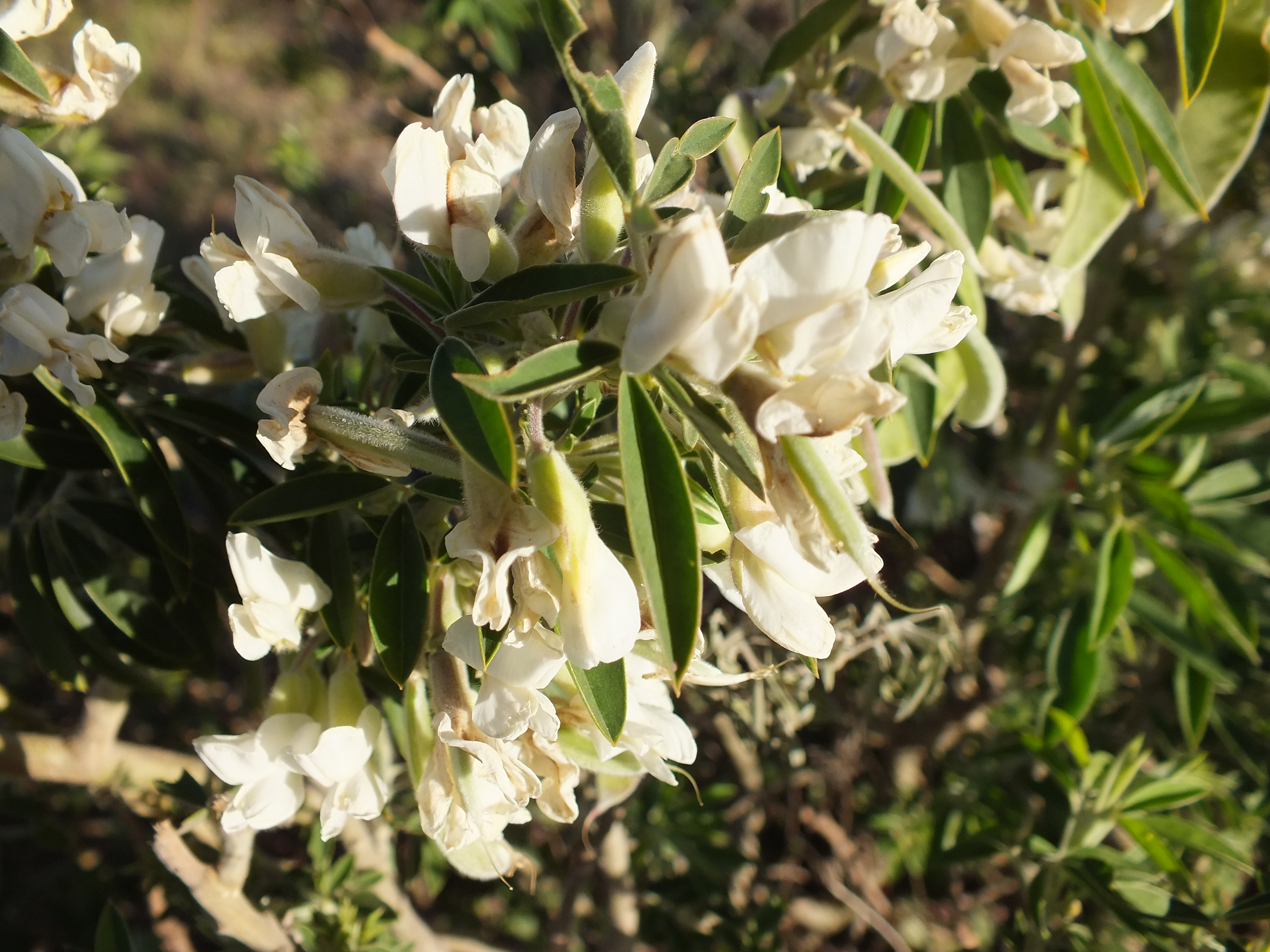 Flor de Chamaecytisus palmensis (Tagasaste) en la Isla de La Palma, Islas Canarias.